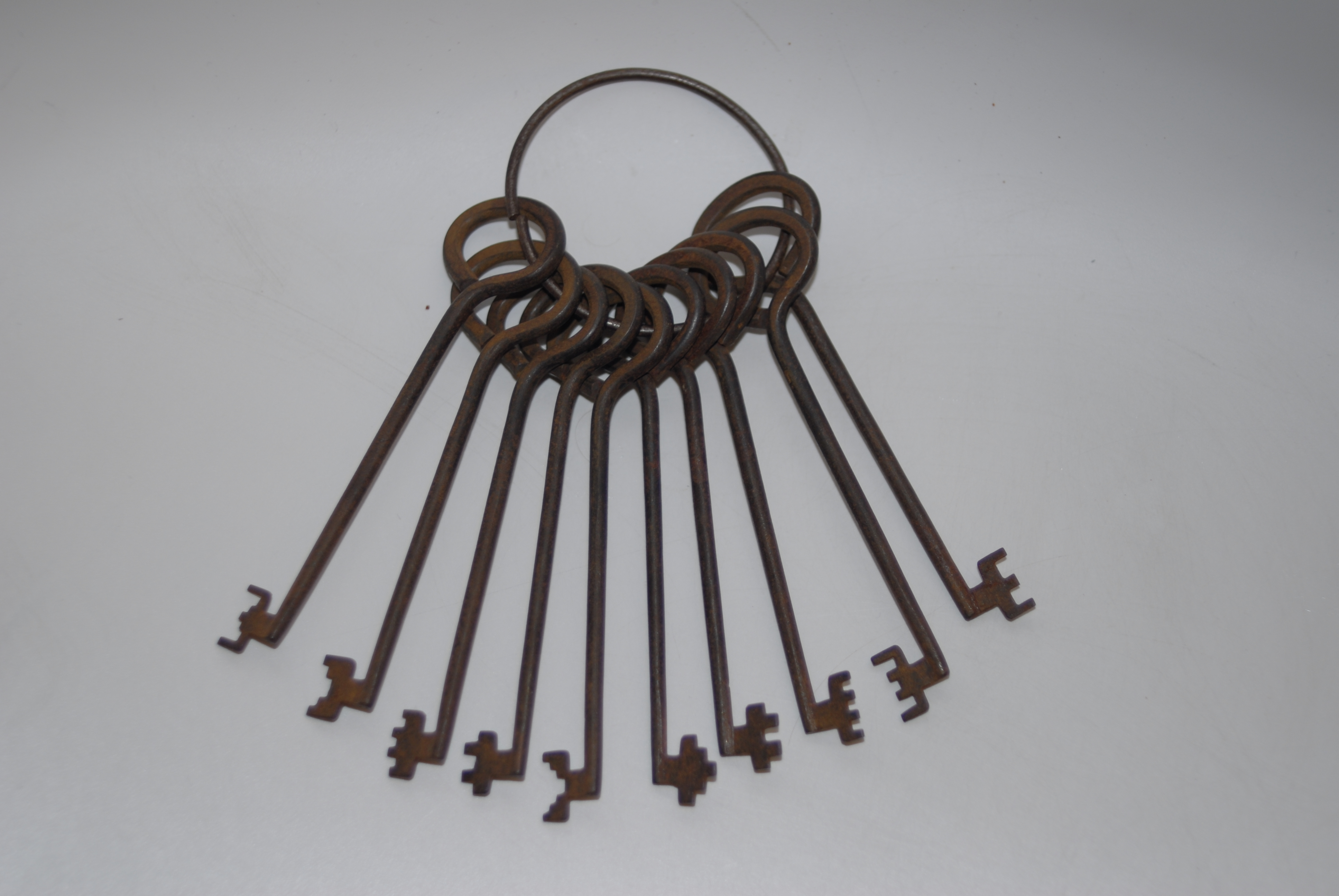 Rossignol de serrurerie pour serrure à gorge